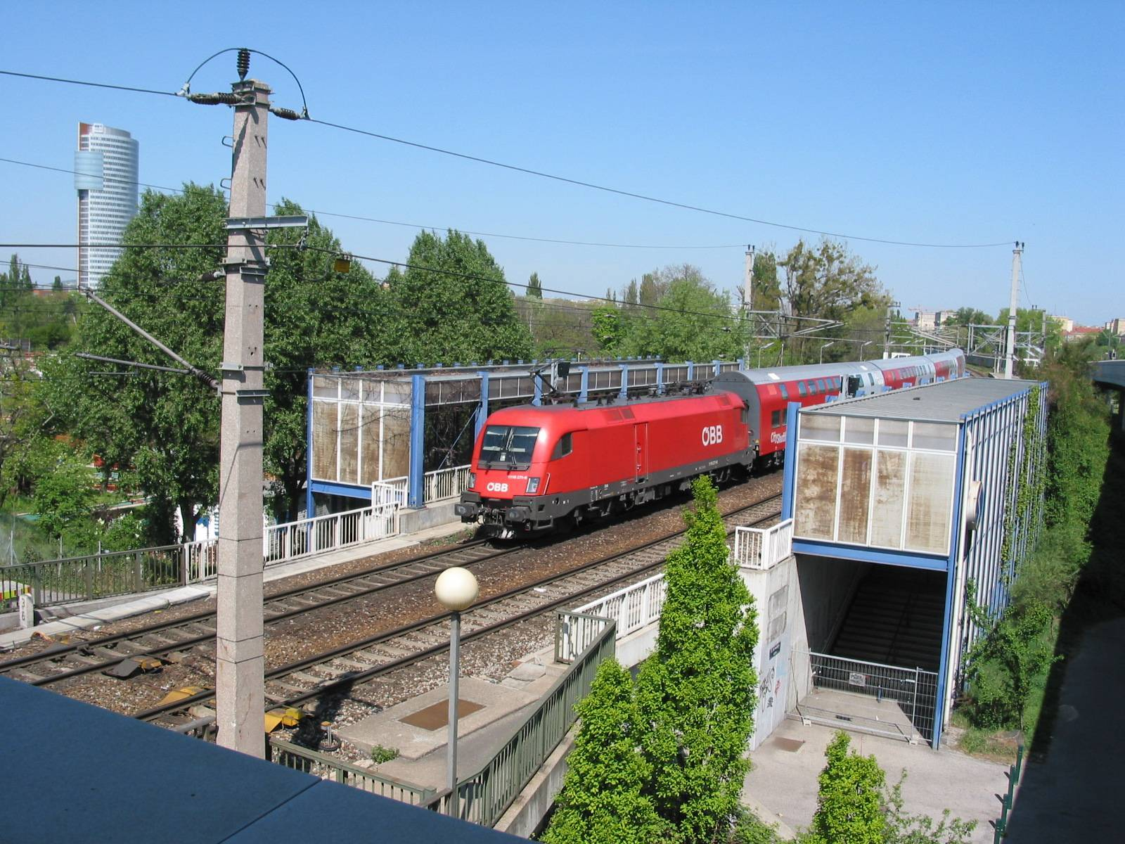 de: ehem. Haltestelle Strandbäder der S-Bahn Wien en: former Station Strandbäder of the Vienna S-Bahn pl dawna stacja Strandbäder wiedeńskiego S-Bahnu